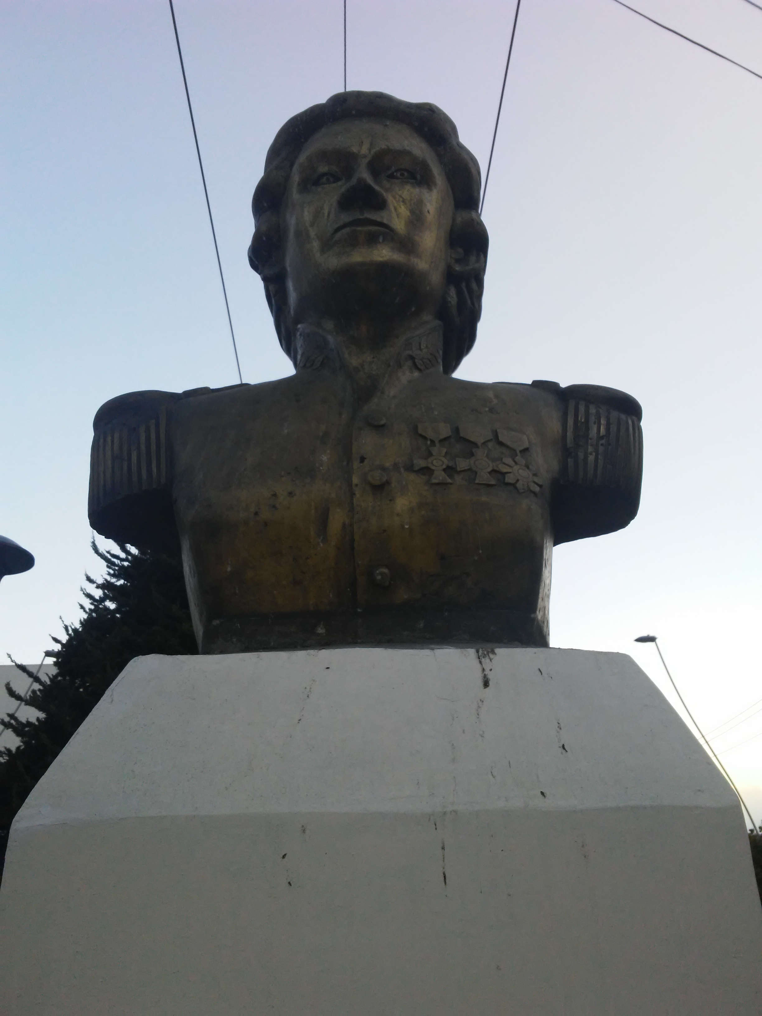 Juana Azurduy de Padilla This medium shows the protected monument with the number L/00-243 in Bolivia.